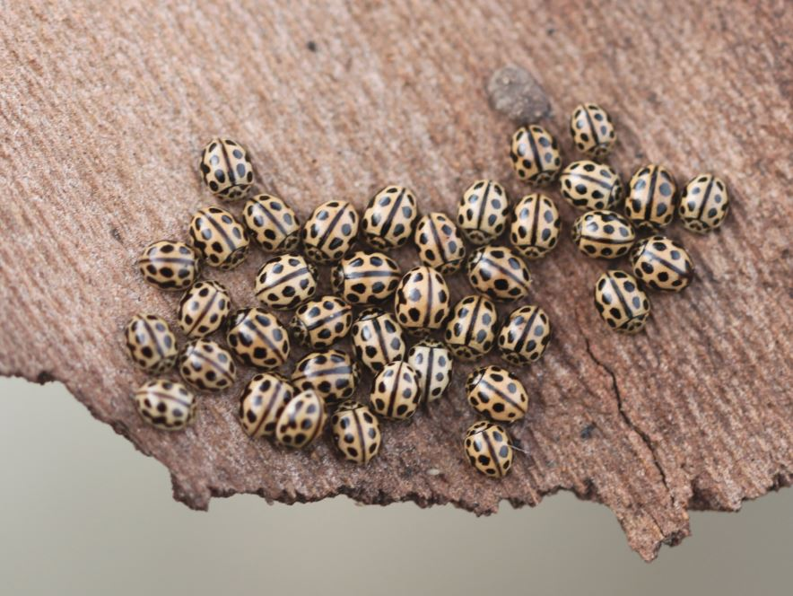 Aggregation von Sechzehnpunkt-Marienkäfern (Tytthaspis sedecimpunctata) am 17. Januar 2020 unter einem Rindenstück